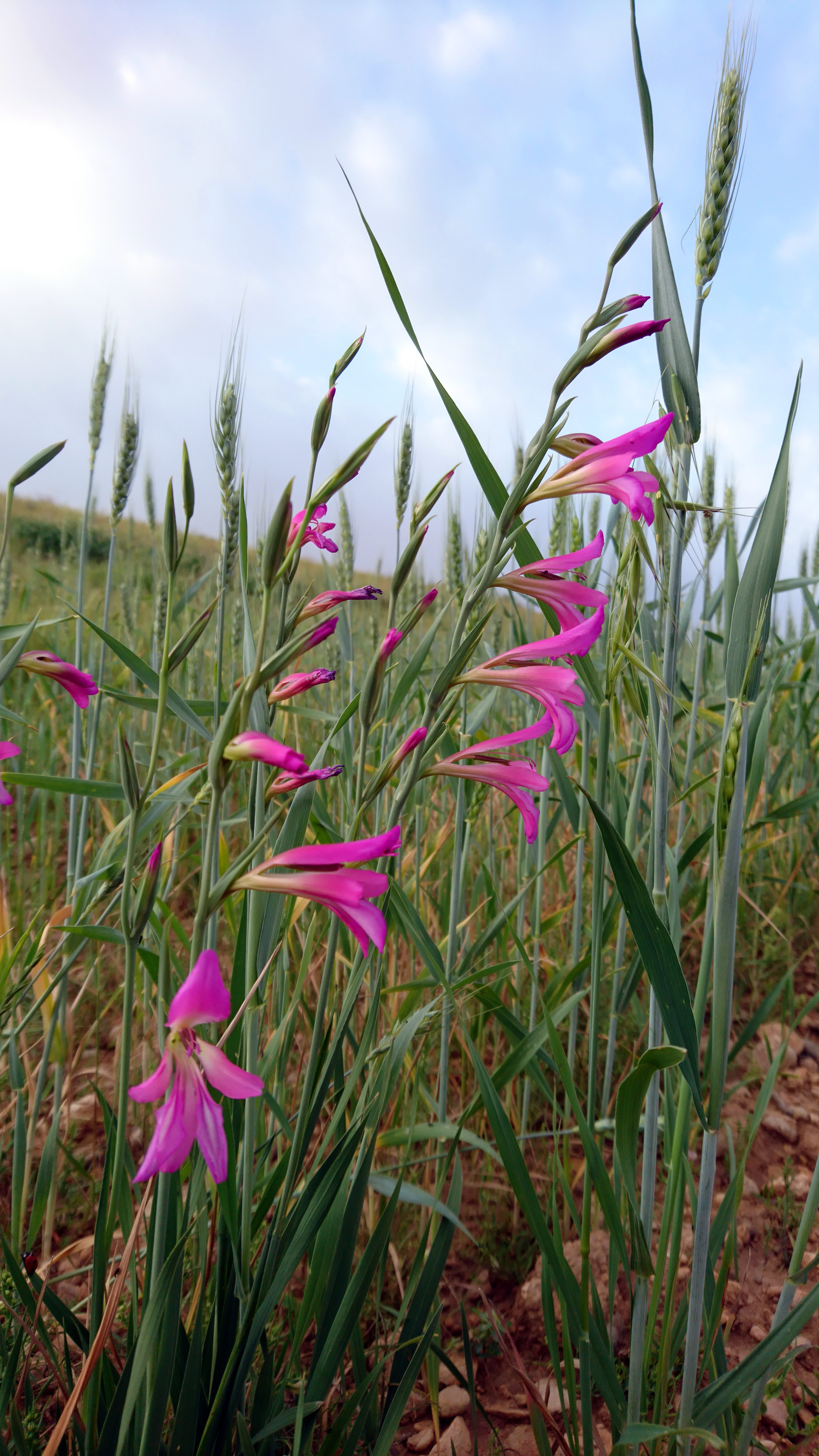 گلایل وحشی، بهبهان